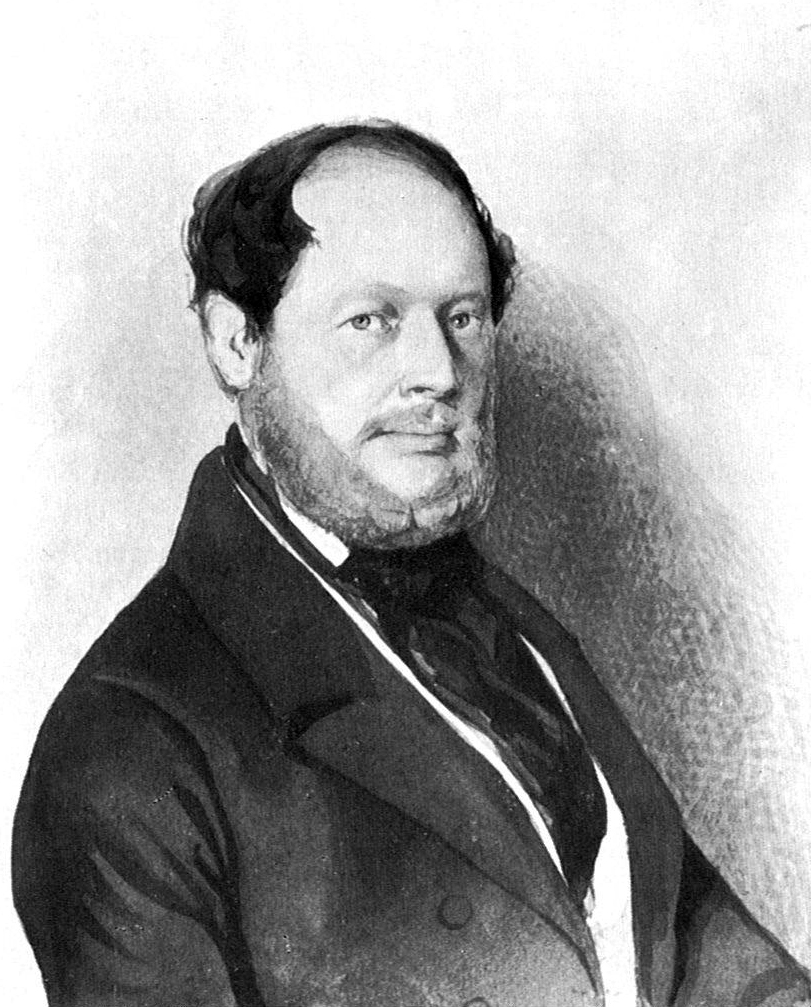 Selbstporträt Conrad Kreuzers